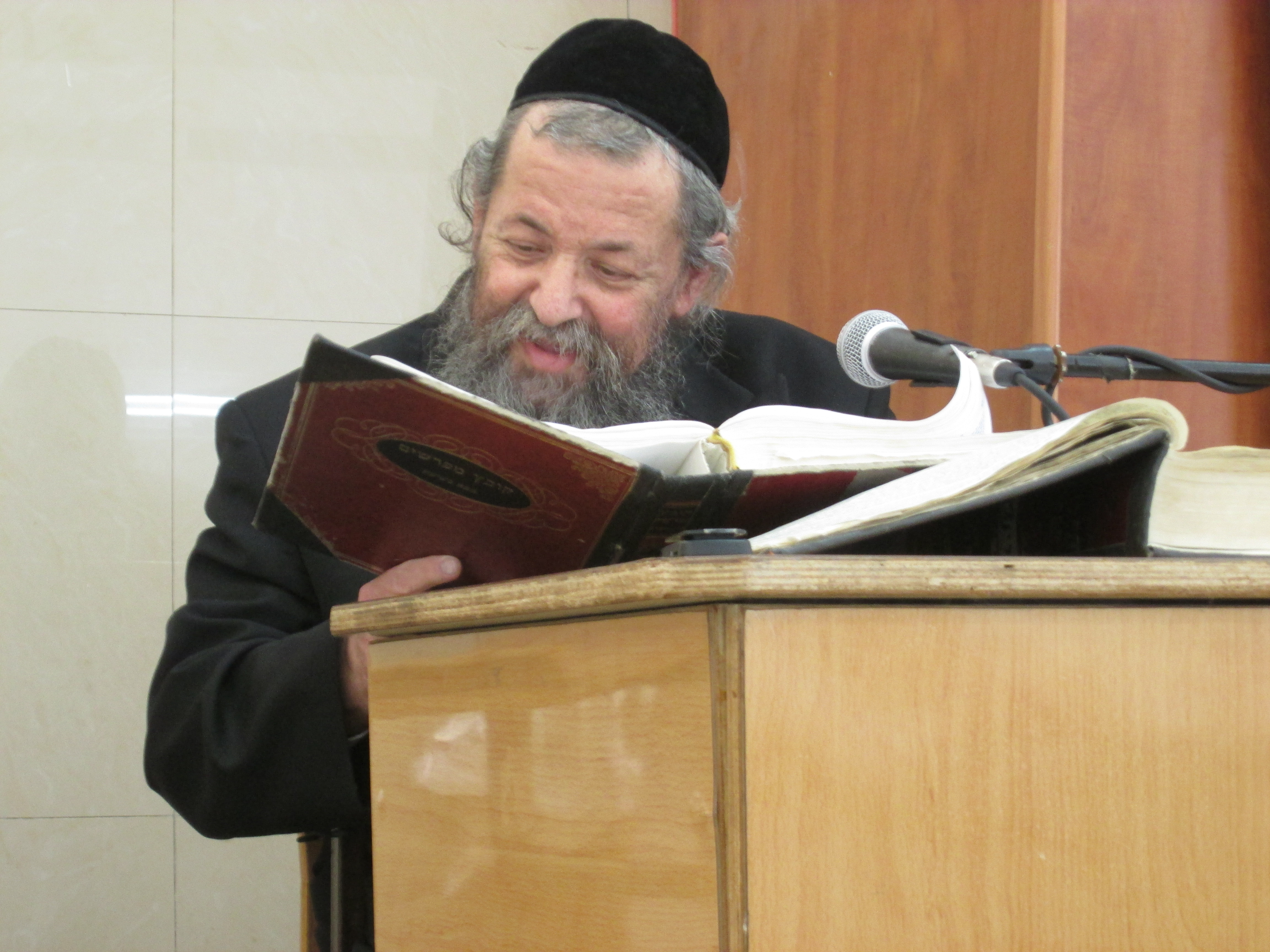 ראש הישיבה כיום מאז פטירת אביו בשנת תשס"ו